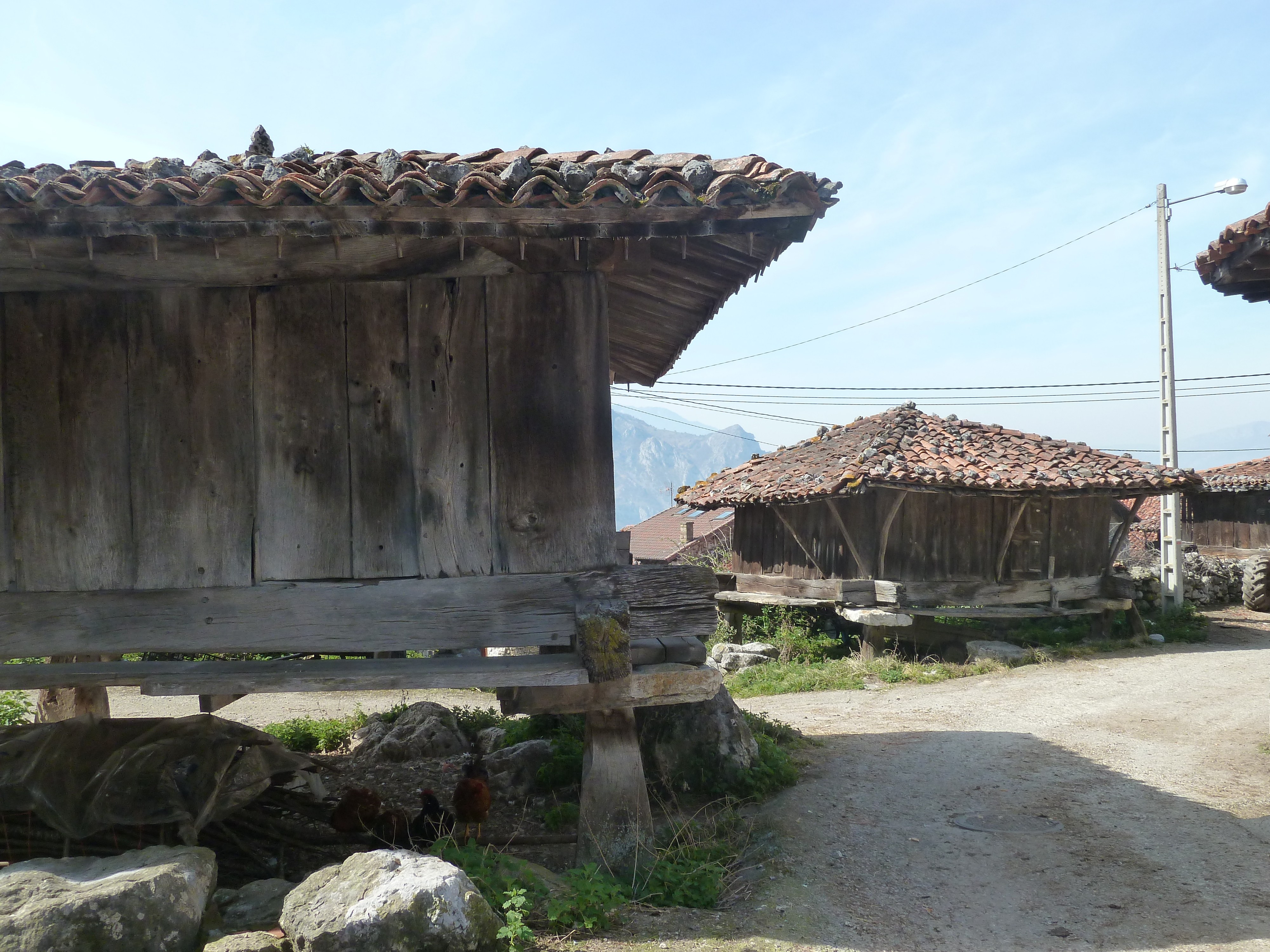 Horrios del llugar de Bermiego (Quirós).